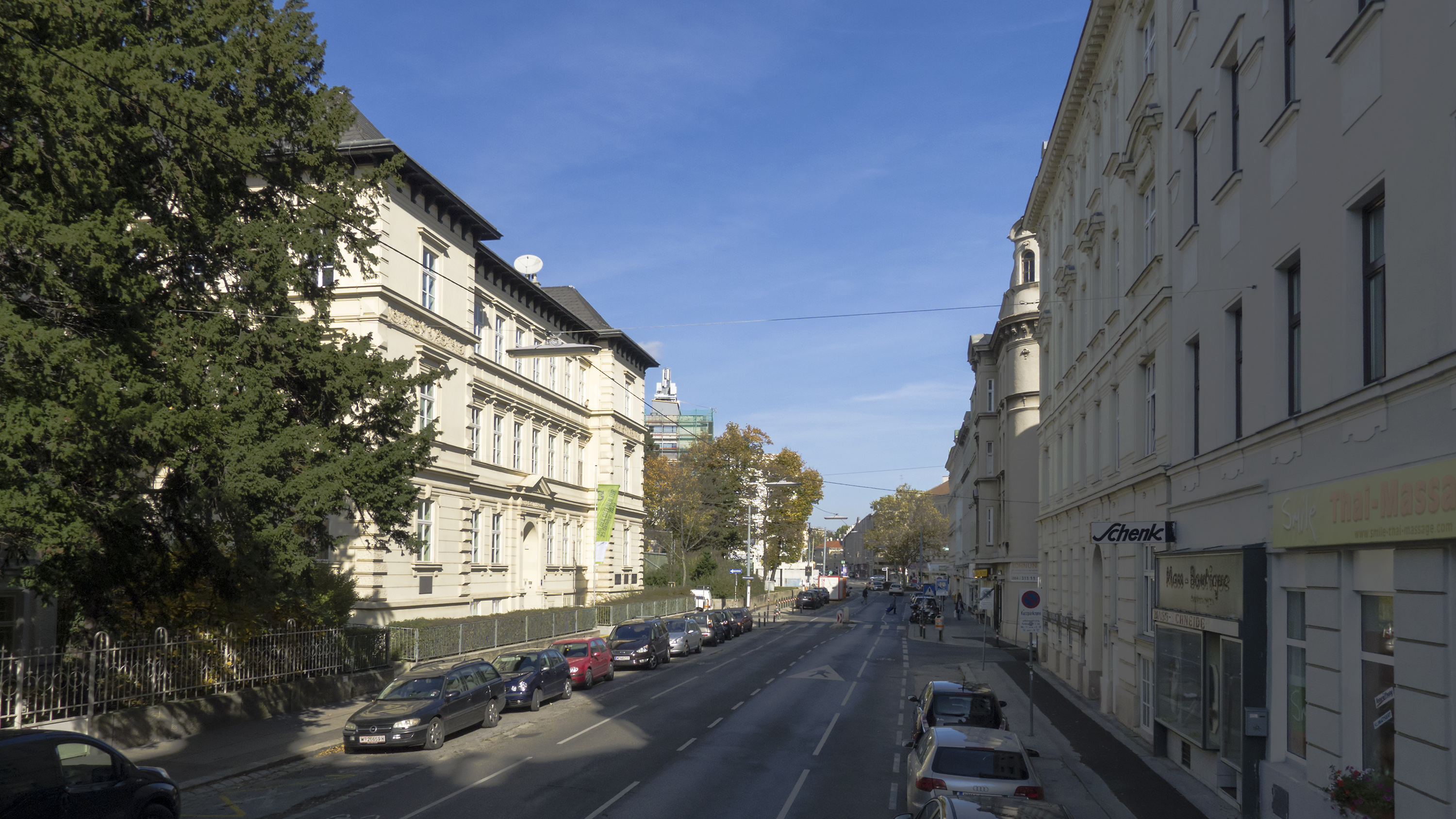 Gymnasiumstraße in Wien 19 bei Nr. 60a Richtung Norden